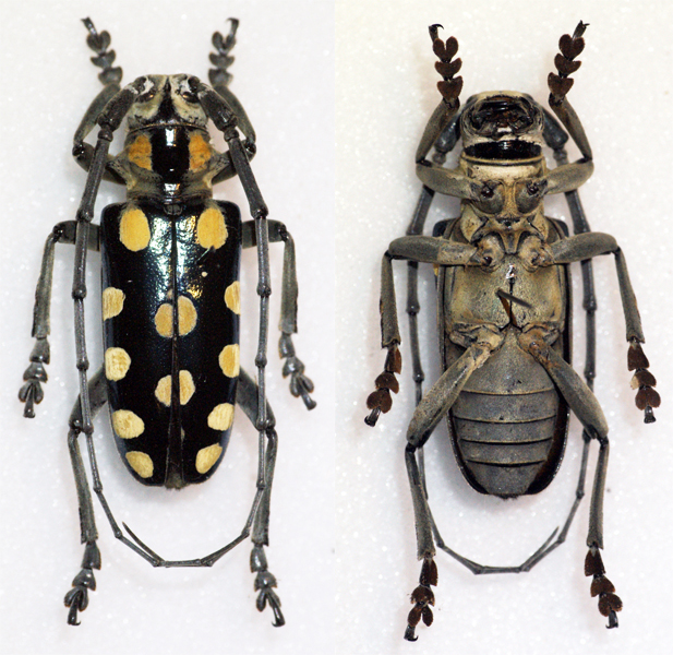 Schultze,1923 Sex: Male Data: 06-2012 - Mindoro - Philippines Size: ?